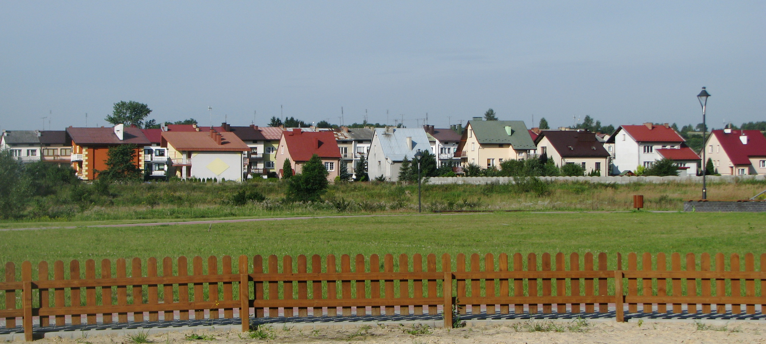 Osiedle Oględowska w Staszowie, widziane od strony rzeki Czarnej.